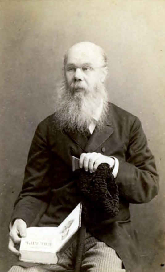 фото Олександра Кониського